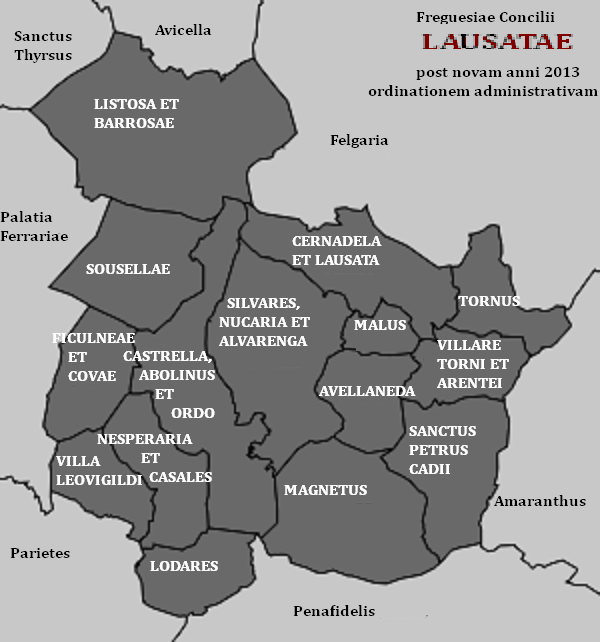 Concilii Lausatae freguesiae post novam anni 2013 ordinationem administrativam